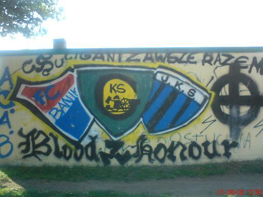 Blood & Honour Katowice